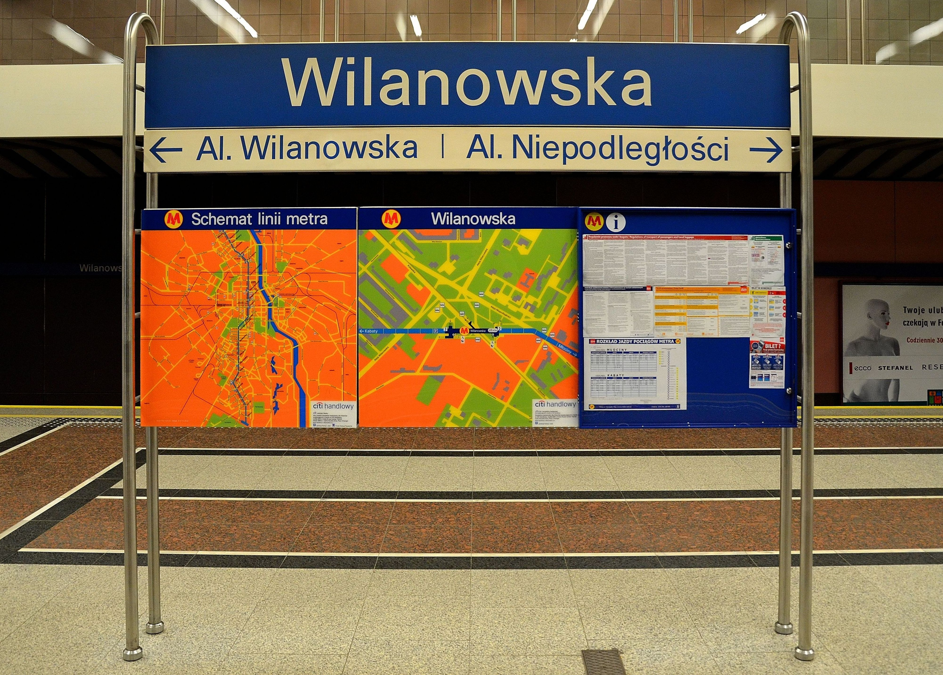 Tablica informacyjna na peronie stacji metra Wilanowska w Warszawie